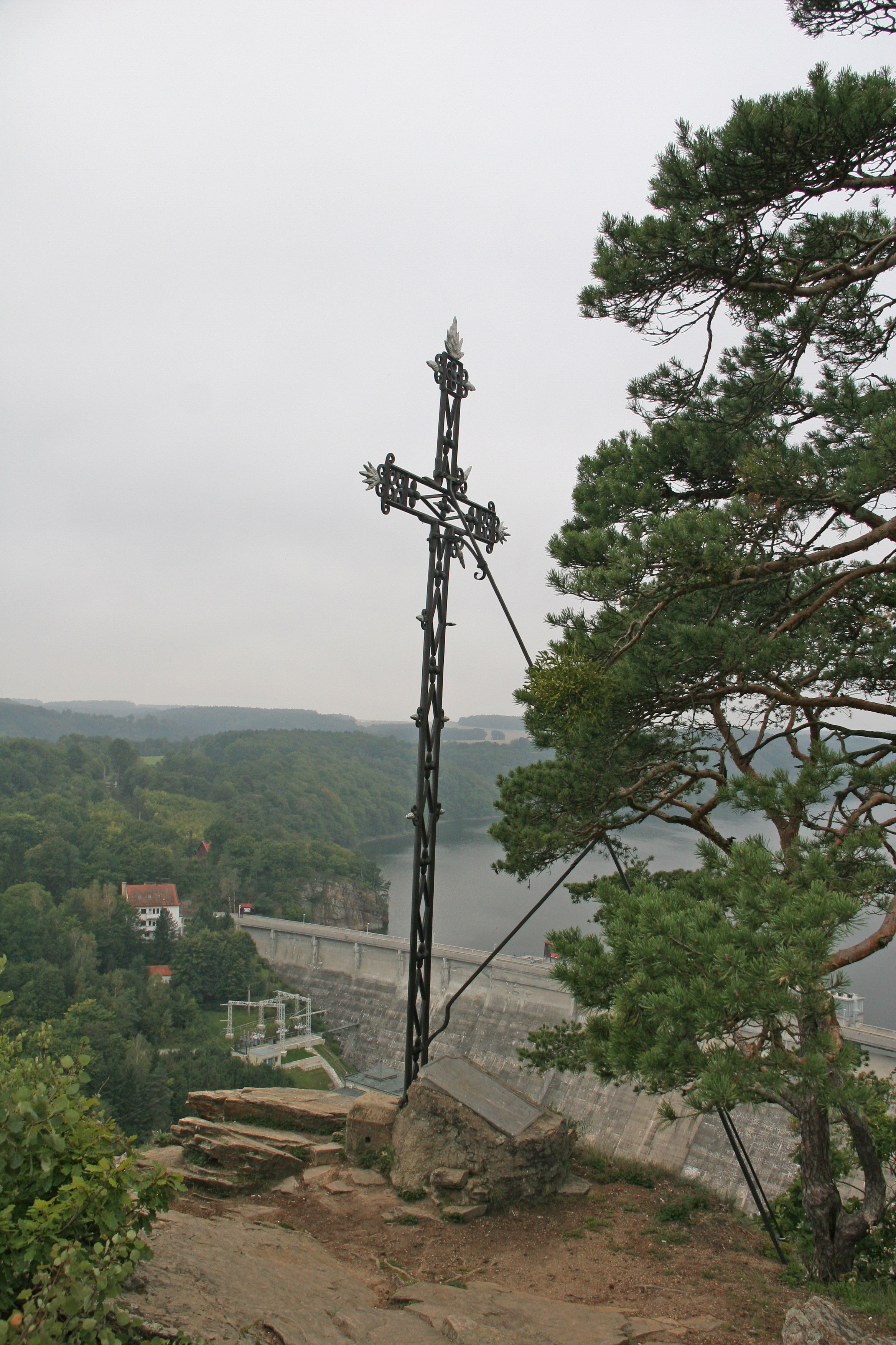 Kříž, na skále, nad hrází přehrady, Onšov (okres Znojmo).